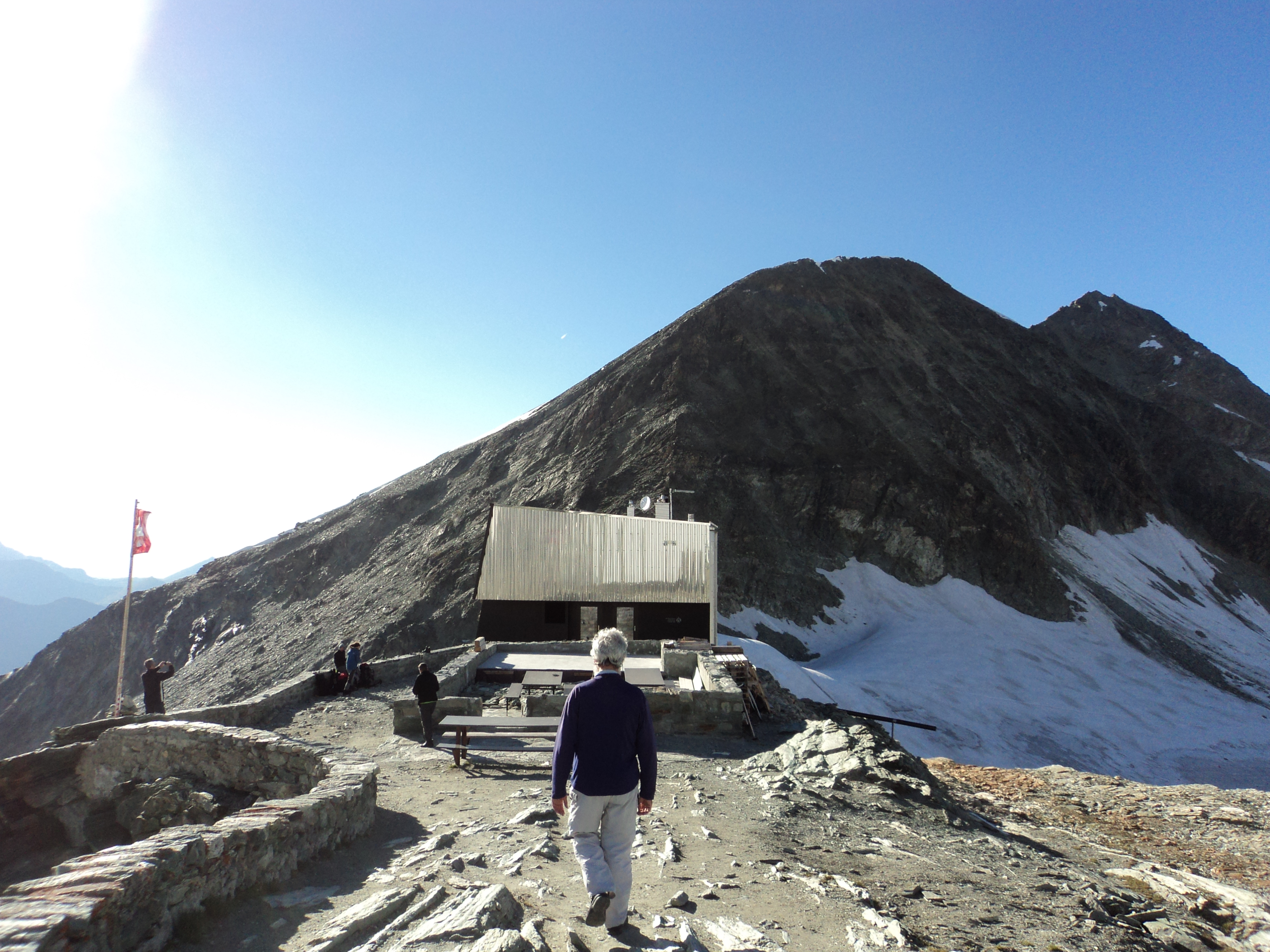 La Cabane de Tracuit con alle spalle Les Diablons